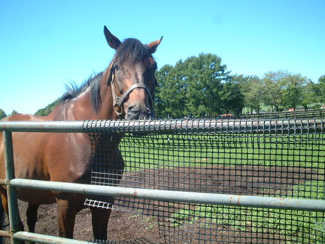 静内スタリオンにてアサティス（危険注意）を撮影。